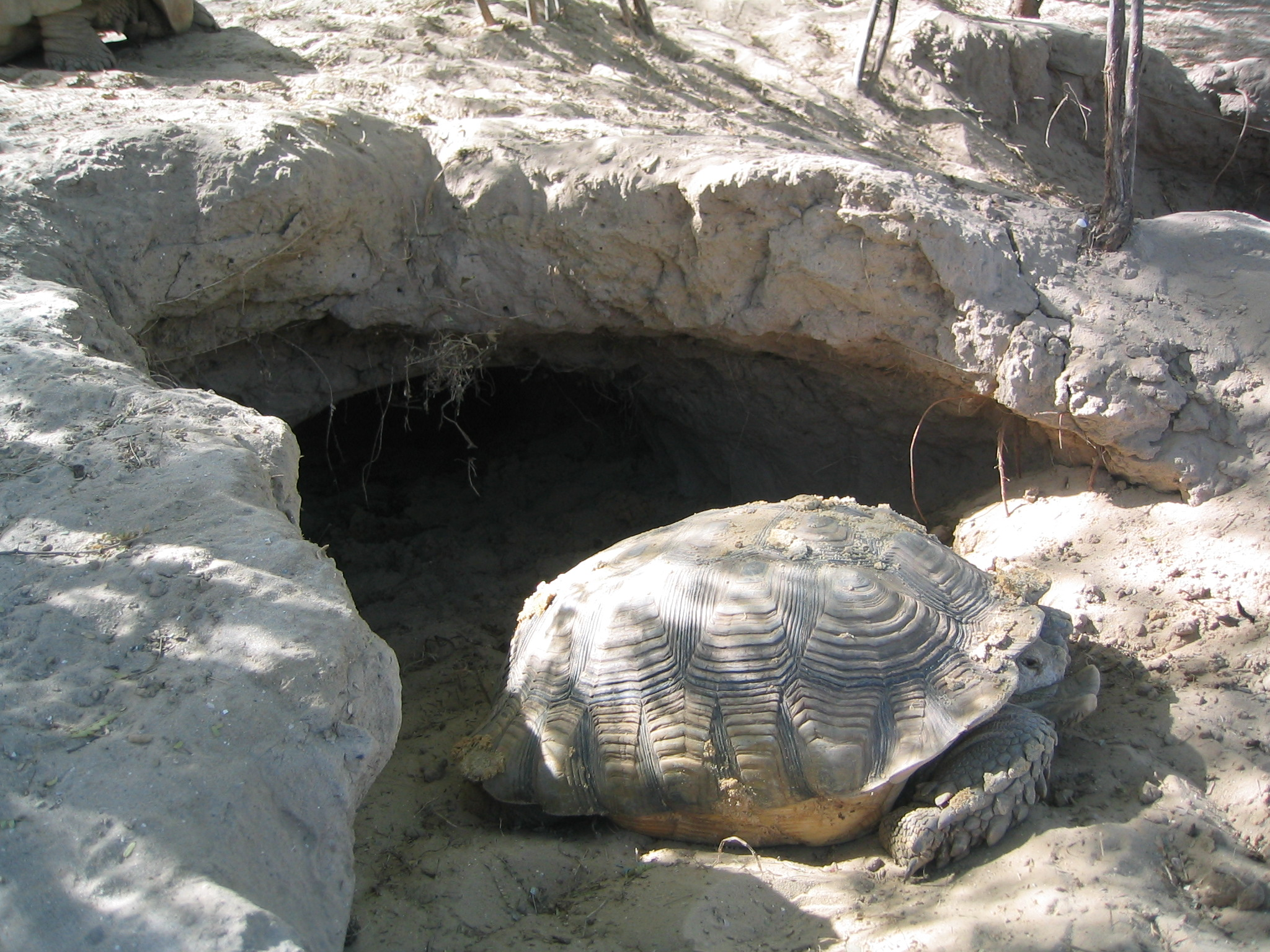 Tortue géante (Geochelone sulcata) dans la réserve de Guembeul au Sénégal